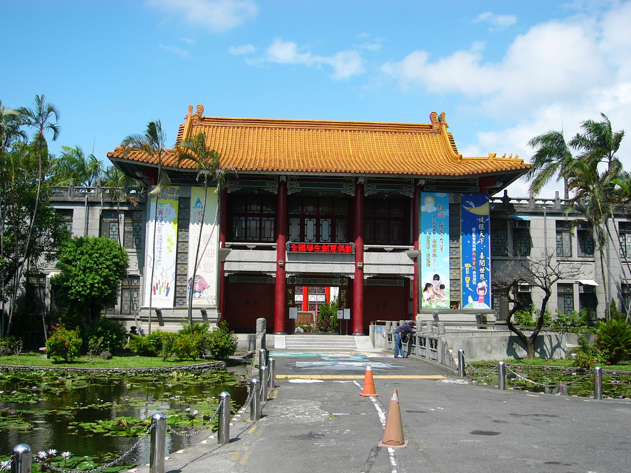 中文（台灣）: 臺北市南海學園內，中華民國國立中央圖書館原館舍。